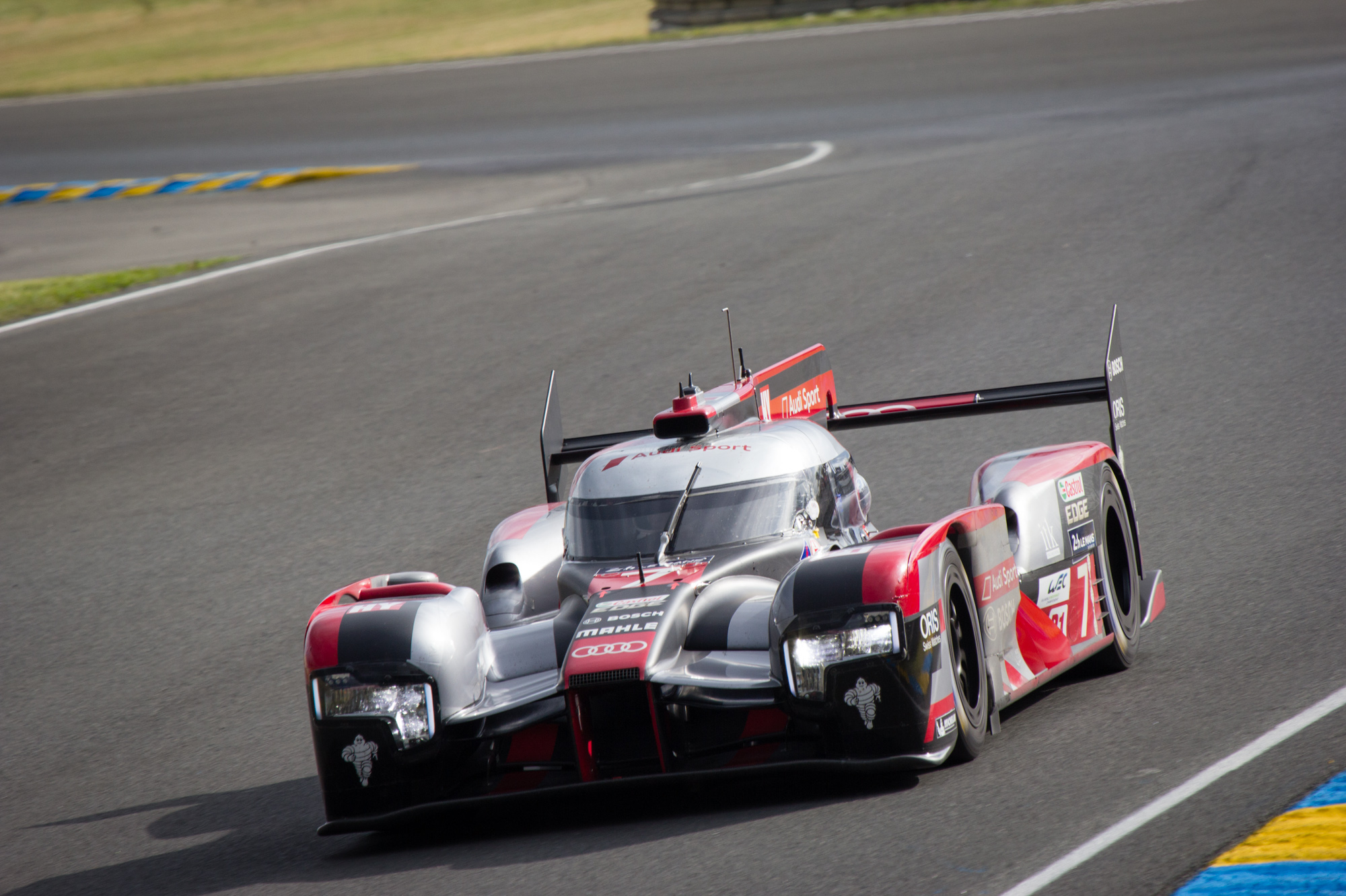 Drivers: Marcel Fässler, André Lotterer, Benoît Tréluyer